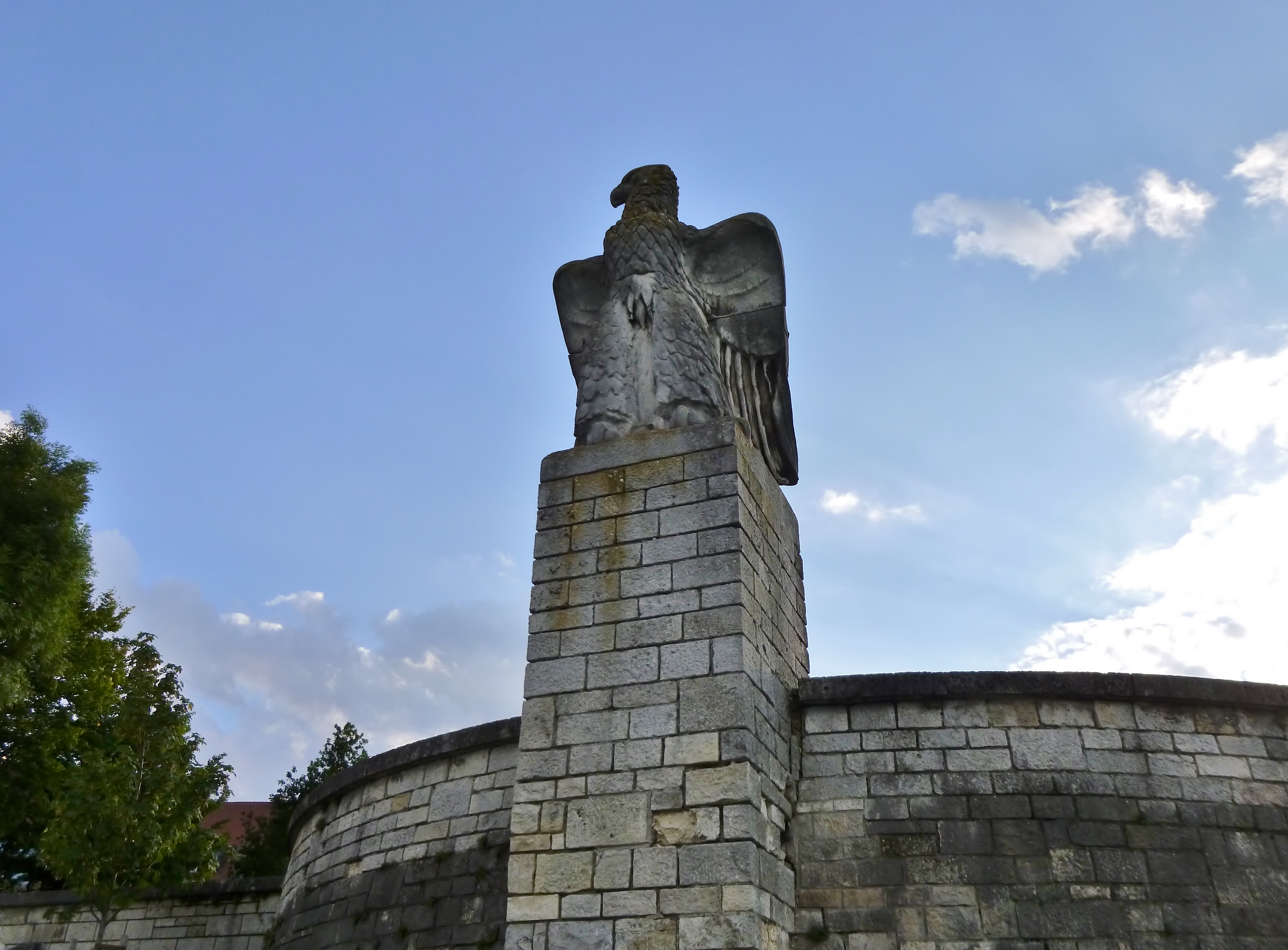 Die Bastion dees Schöpfwerks Straubing an der Donau, Nähe Gscheiderbrückl in Straubing. Der Adler ist eine Monumentalplastik aus Kalkstein aus dem Jahr 1941/42 von Fritz Schmoll;This is a photograph of an architectural monument.